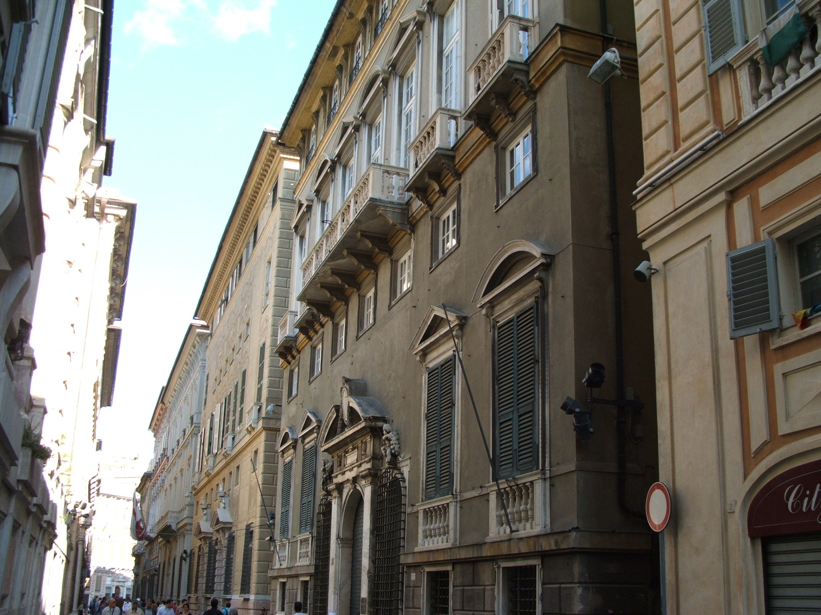 Genova, Via Garibaldi Palazzi in Via Garibaldi verso piazza Fontane Marose